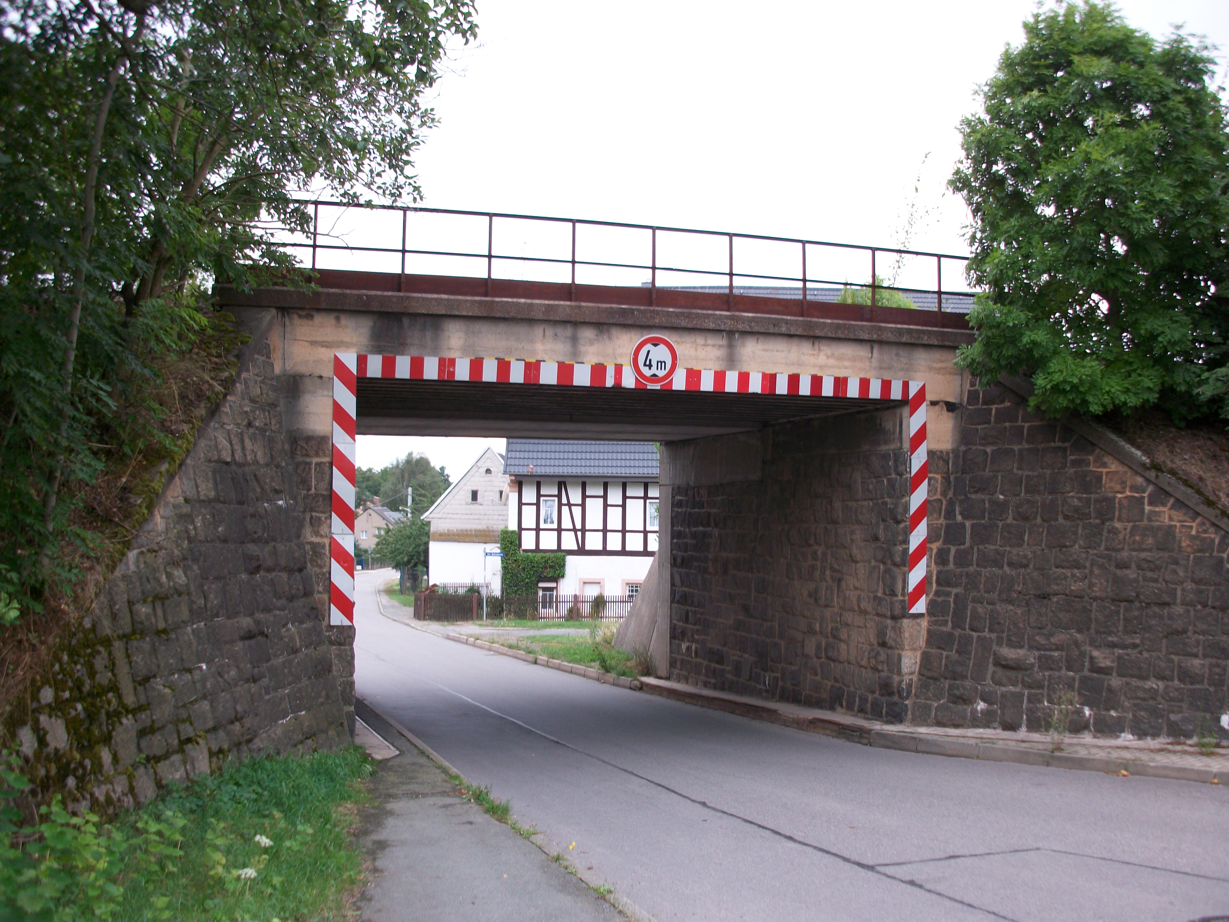 Reinholdshain, Viadukt am Relsner Eck der Muldentalbahn